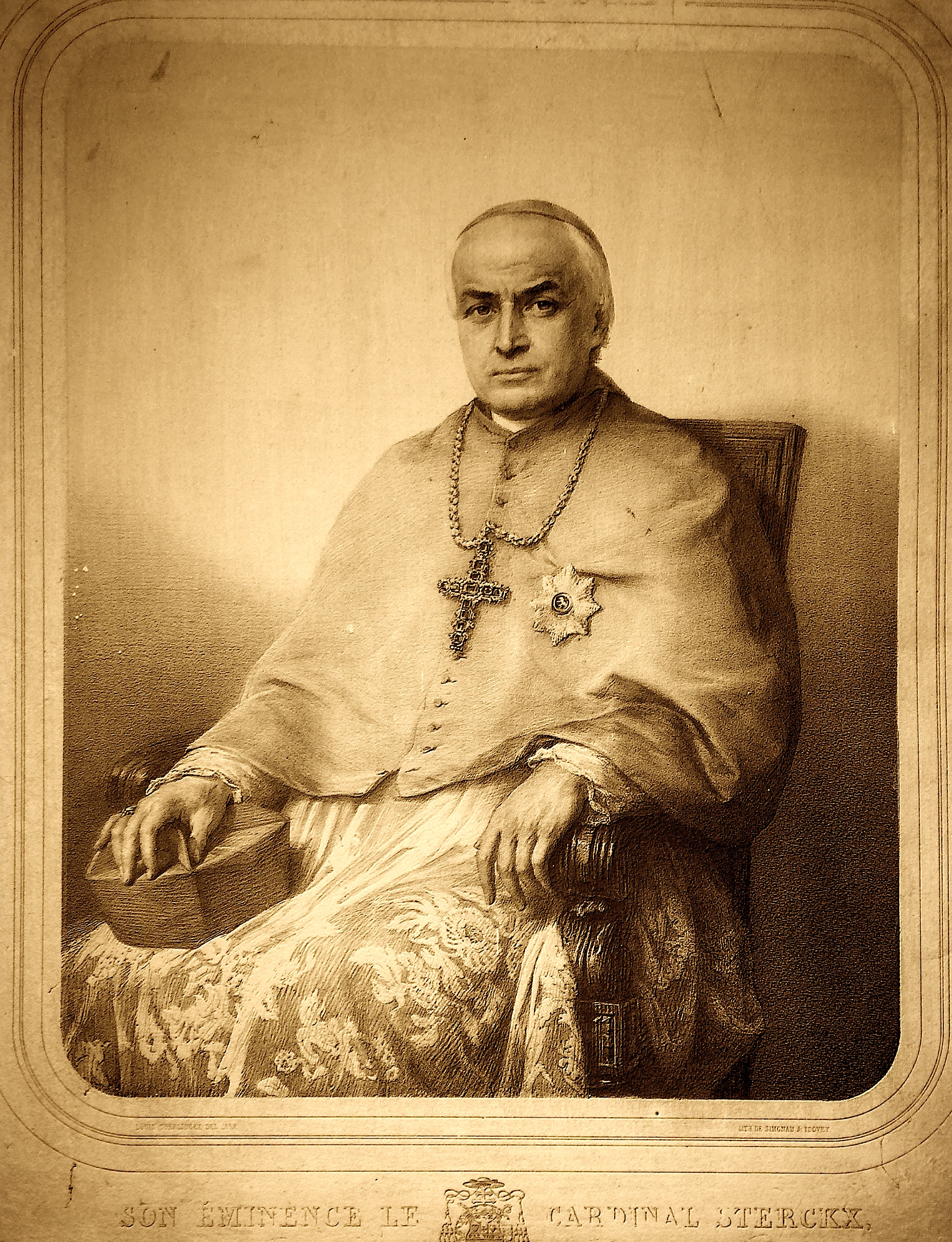 Lithografie Simonau & Toovey 1852